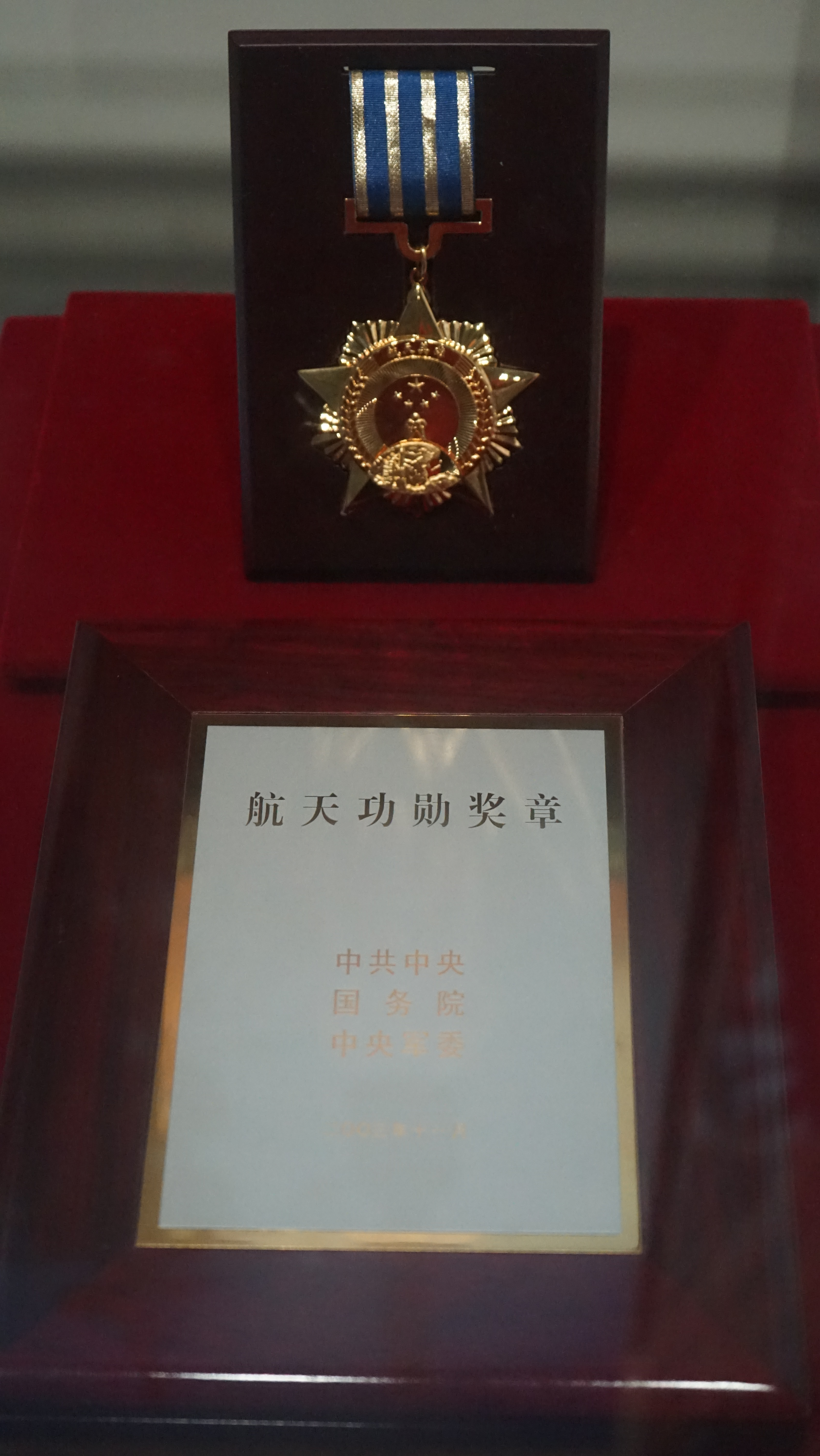 中文（中国大陆）: 中共中央、国务院、中央军委授予中国第一位进入太空的航天员杨利伟的航天功勋奖章样章。一级文物。